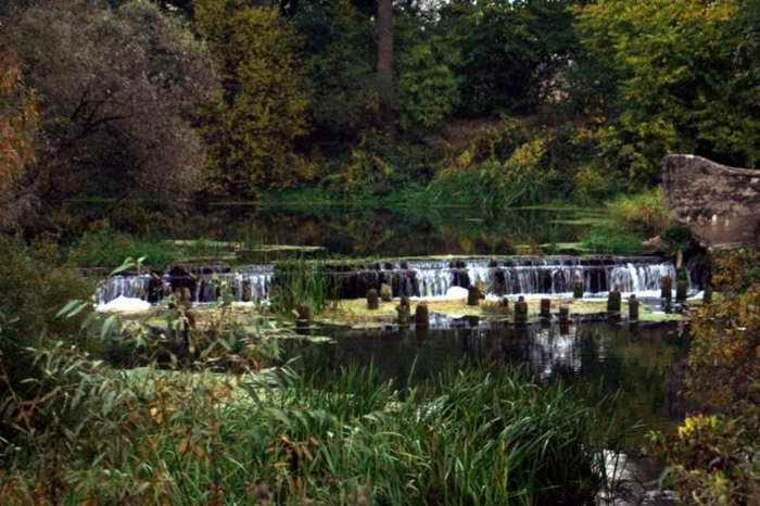 Brok - w dolnym biegu zwana Broczysko, w Orle.